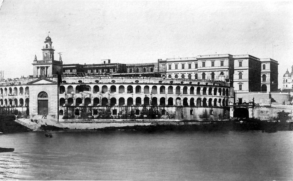 Vista de la antigua Aduana de Buenos Aires, construida por Edward Taylor en 1857 y demolida en 1894.